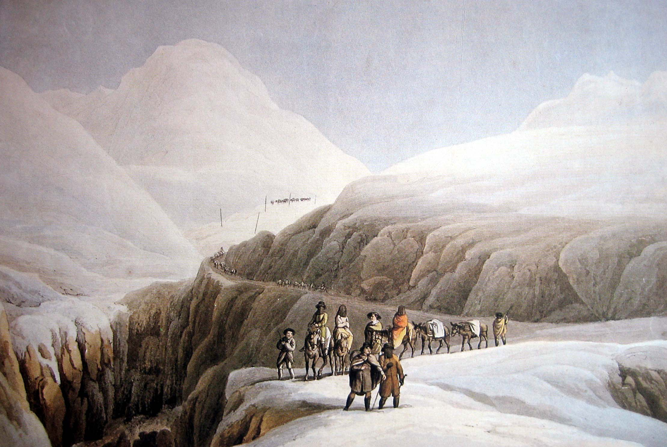 Winterreise 1790 über den Gotthard, kol. Stich von Rothe nach Zeichnung von Jentsch